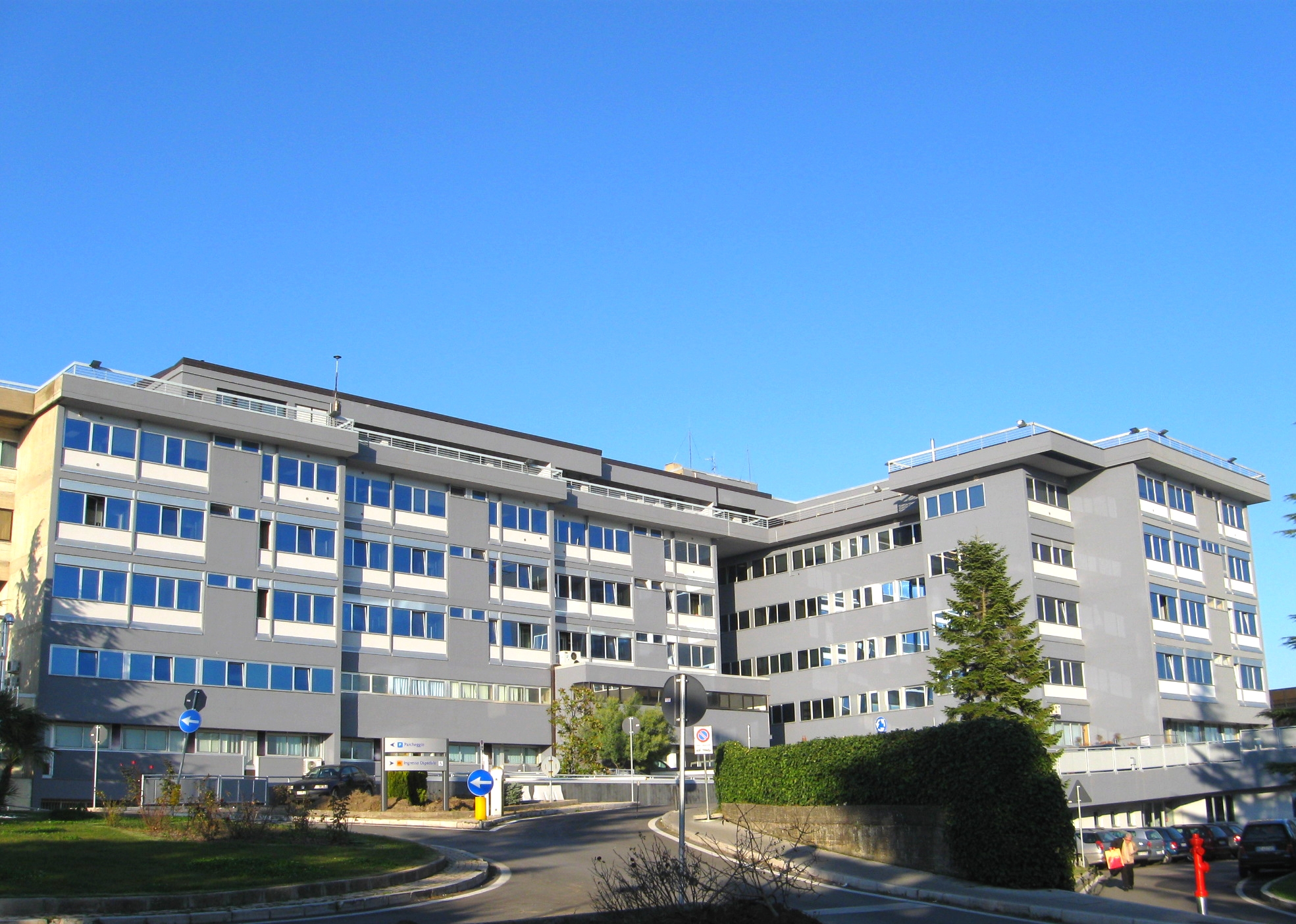 Ospedale IRCCS - CROB di Rionero in Vulture